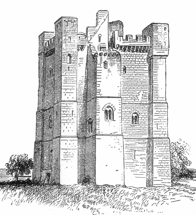 Donjon in Chamboy / Chambois im Département Orne